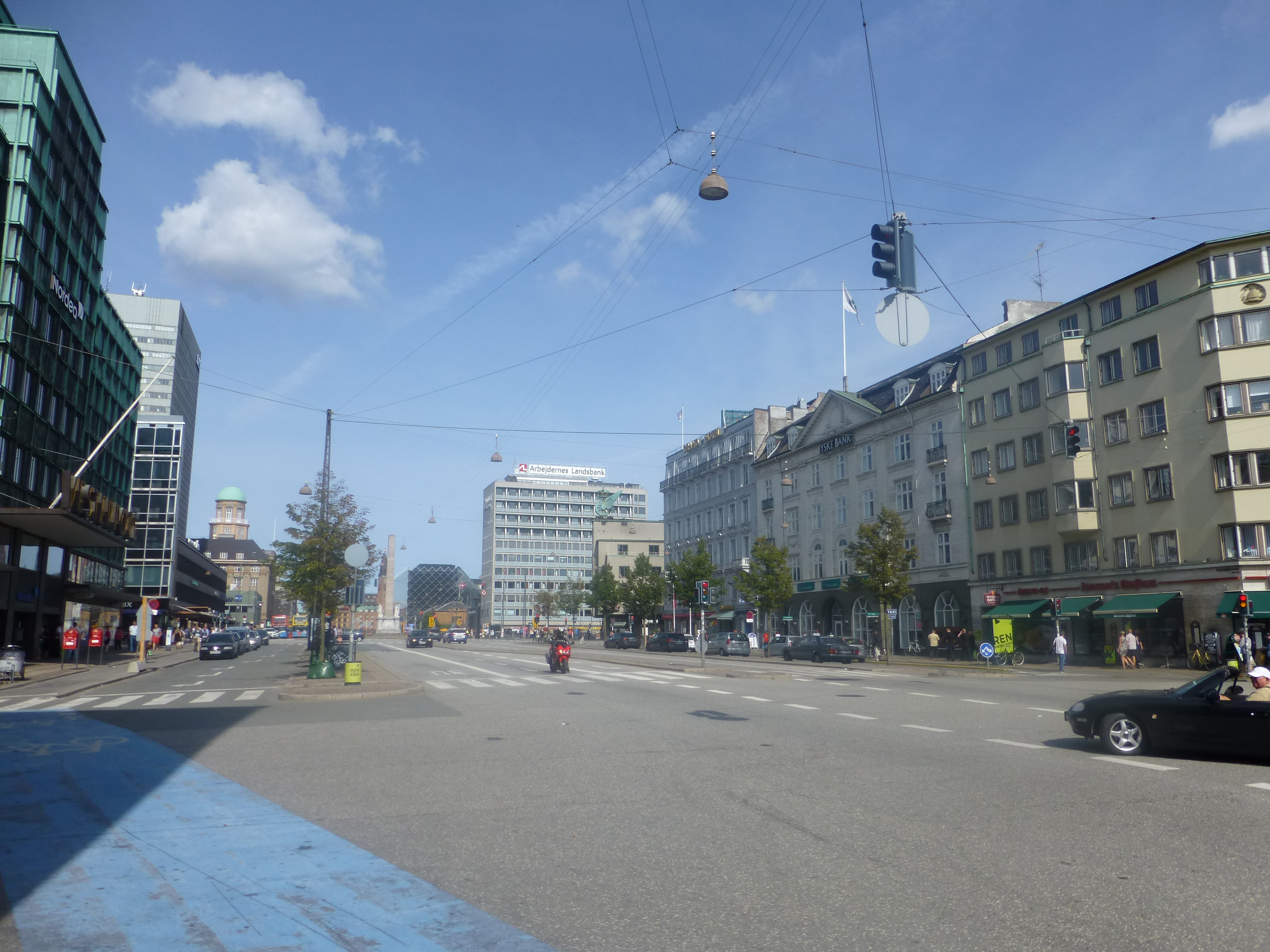 The street Vesterbrogade in Vesterbro in Copenhagen. The part between Trommesalen and Rådhuspladsen is known as Vesterbros Passage.